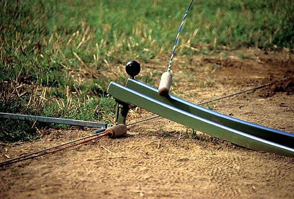 Hornussen: Die Nouss auf dem Bock, Sekundenbruchteile vor dem Abschlag durch dem Stecken